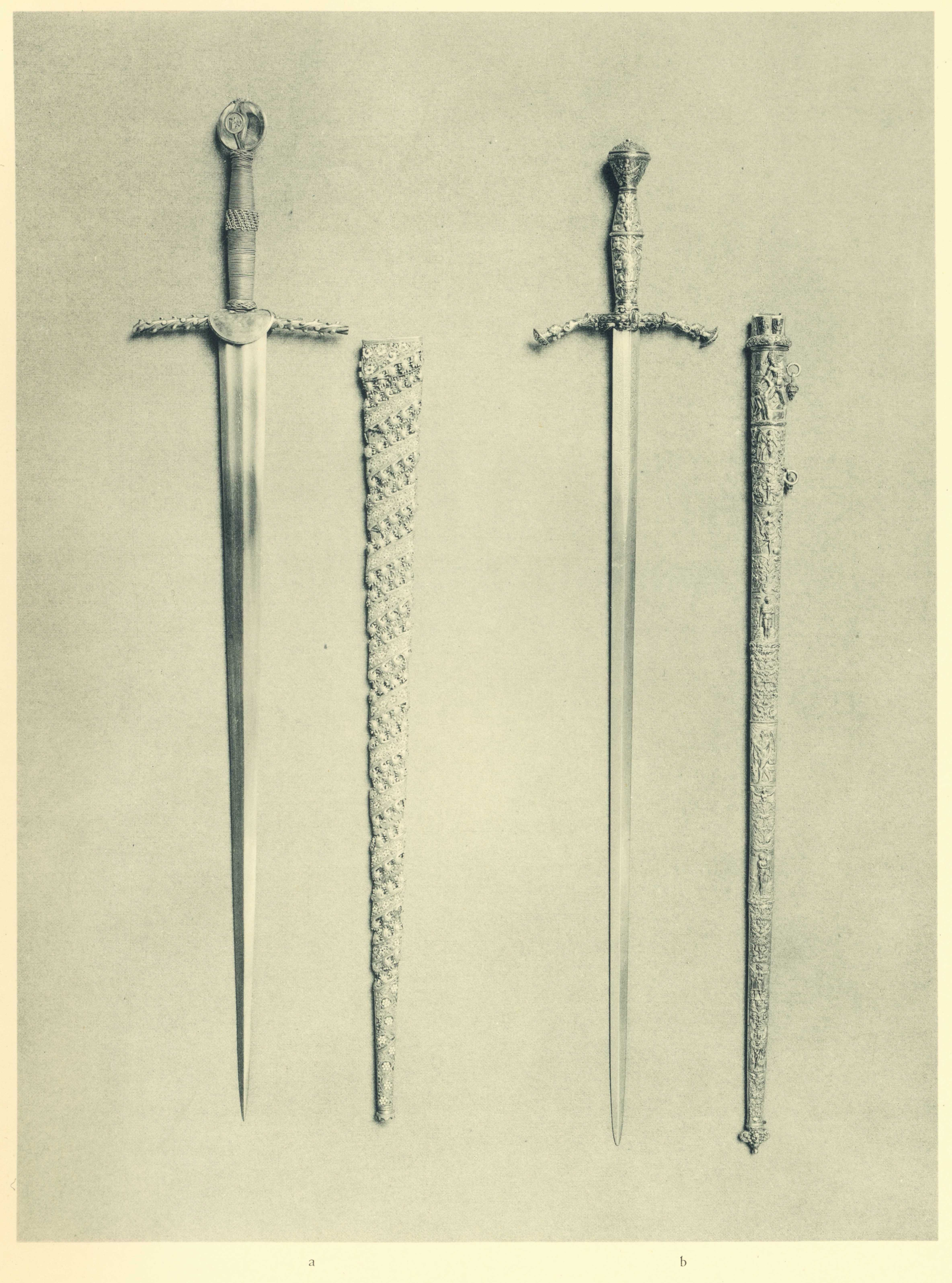 a. Kurschwert Friedrichs des Streitbaren von Sachsen (1425); b. Kurschwert des Kurfürst Moritz von Sachsen (1547)